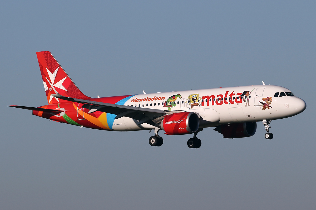 EHAM